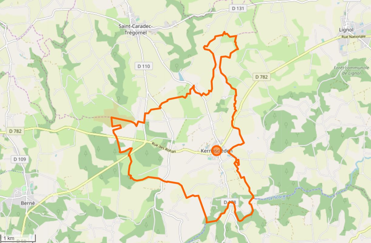 Cette carte a été créée à partir des données du projet openstreetmap. This map may be incomplete, and may contain errors. Don't rely solely on it for navigation.